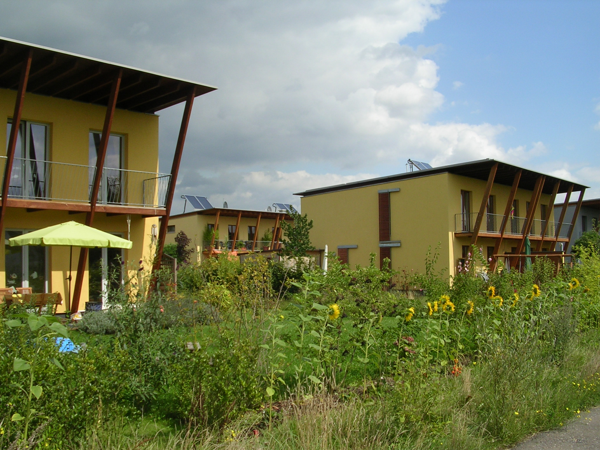 Krefeld-Oppum (North Rhine-Westphalia, Germany): Solarsiedlung Fungendonk